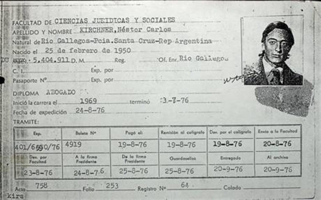 La ficha de Kirchner como estudiante de abogacía en la UNLP